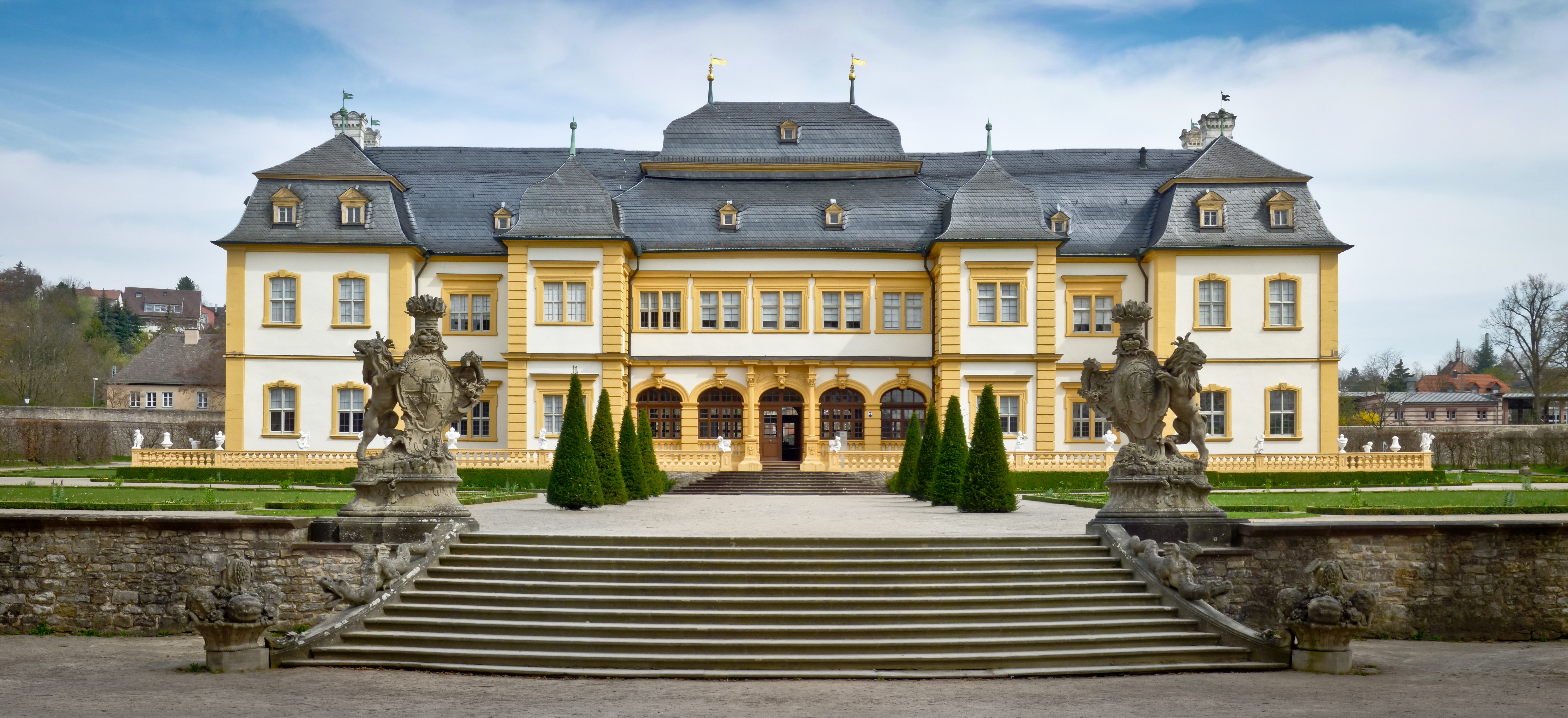 Schloss Veitshöchheim, ehemalige Sommerresidenz der Fürstbischöfe von Würzburg in Veitshöchheim bei Würzburg. Später diente das Schloss den Königen von Bayern. Erbaut wurde es von 1680 bis 1682, letzte Bauarbeiten fanden unter Johann Balthasar Neumann im Jahre 1753 statt.